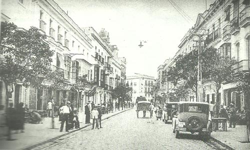 Vista de la calle Larga de Jerez de la Frontera en 1930.